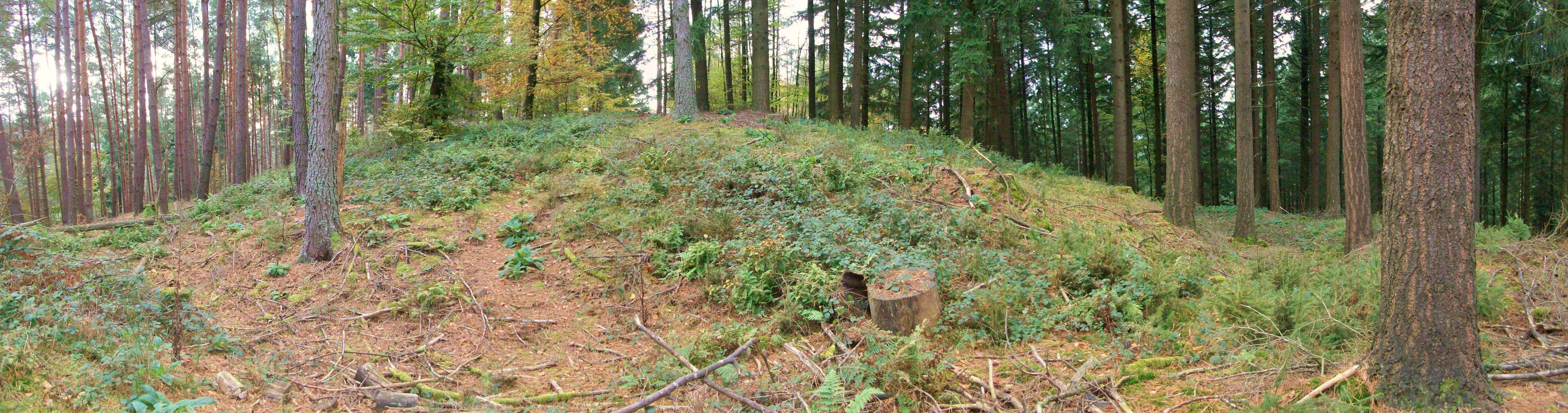 Burg Stutz: Ringwallanlage oder unvollendete hochmittelalterliche Burganlage? Panorama vom Sattel mit Ringgraben